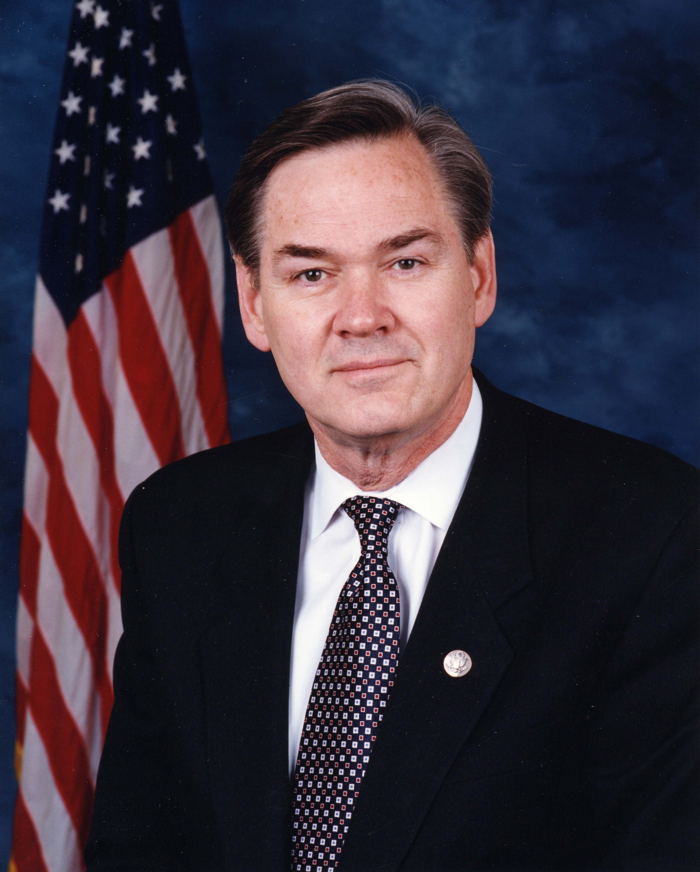 Dennis Moore, U.S. Congressman.